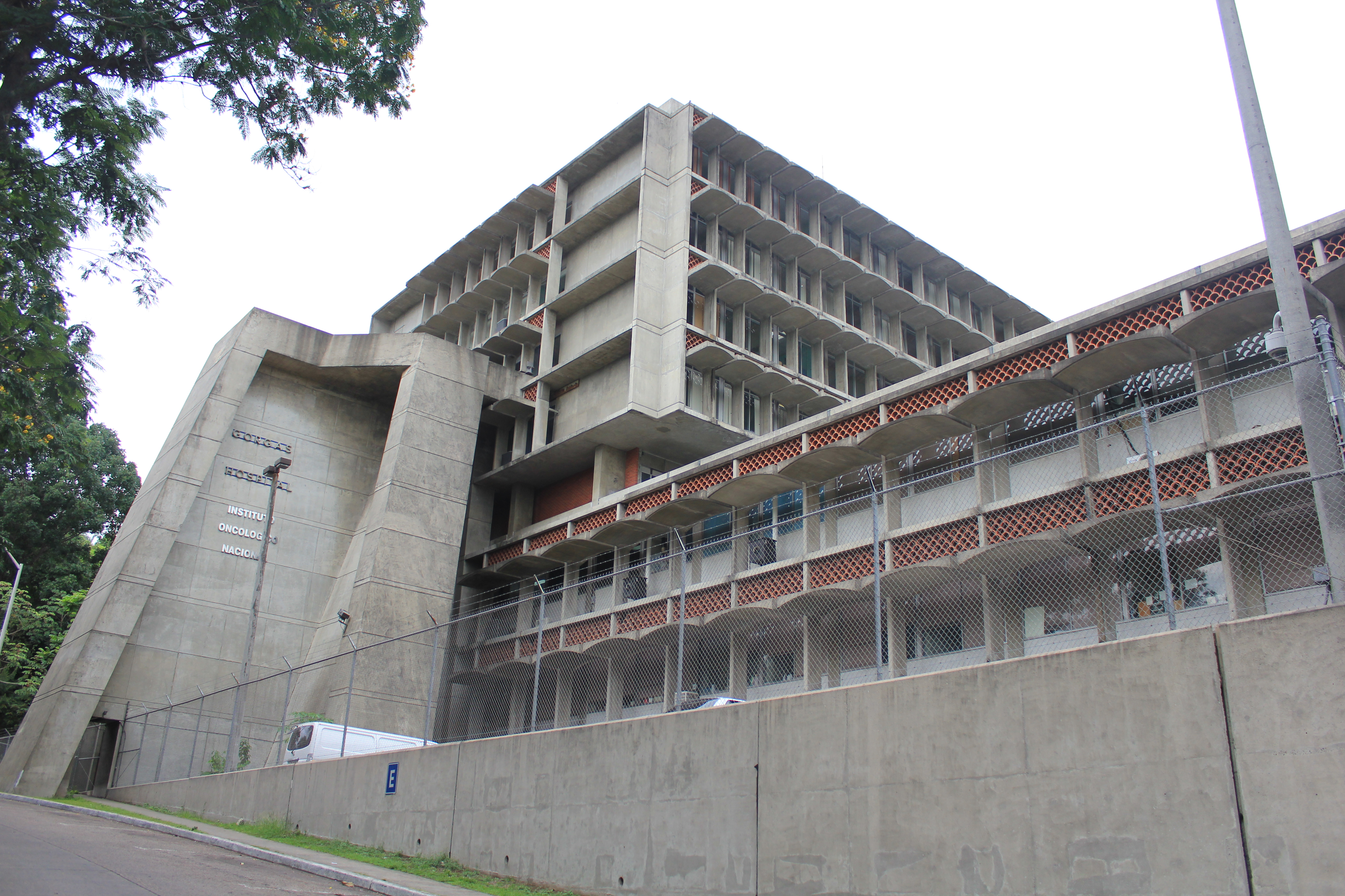 Hospital Gorgas, fundado en 1928. Panamá.